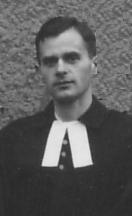 Pastor Dr. Paul Jakobs (1908-1968) konfirmierte mich am 18. März 1945.